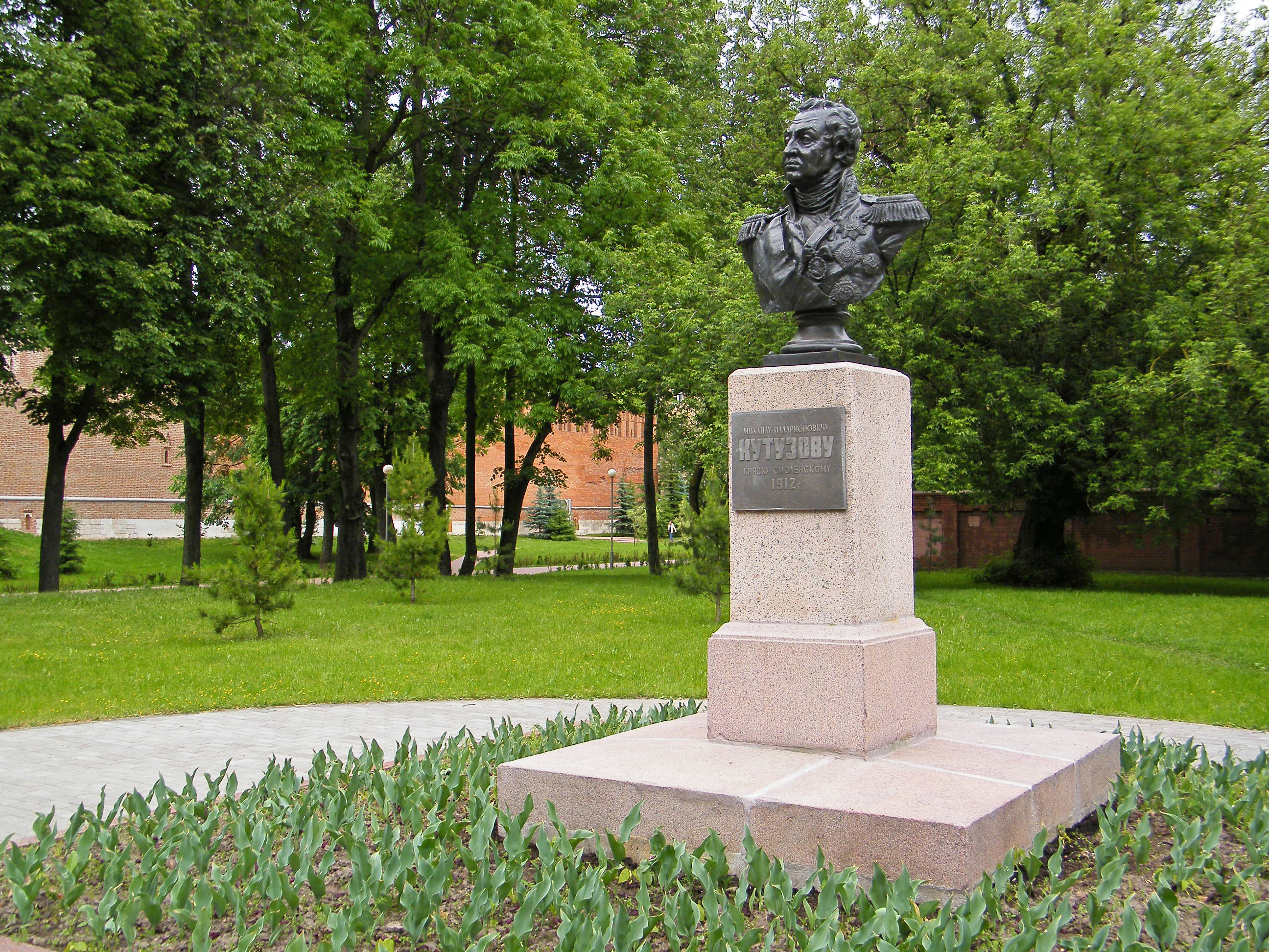 Бюст Кутузова в Сквере Памяти Героев